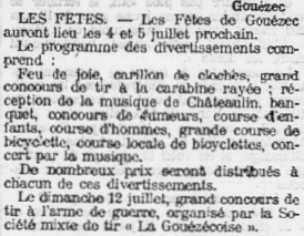 Programme des fêtes de Gouézec organisées les 4 et 5 juillet 1908 (journal L'Ouest-Eclair du 30 juin 1908)